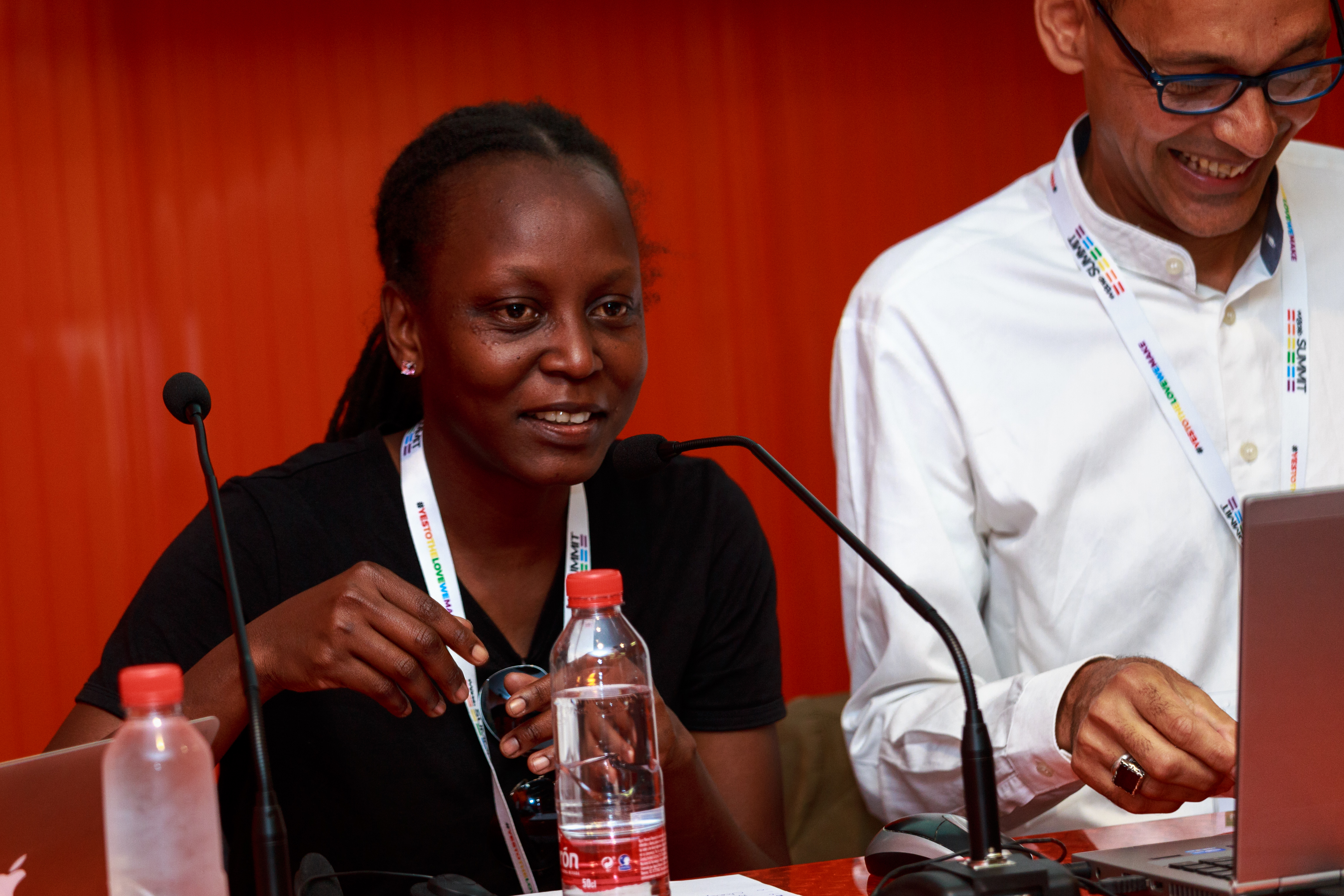 Kasha Jacqueline Nabagesera. Madrid Summit. WorldPride 2017 Madrid.